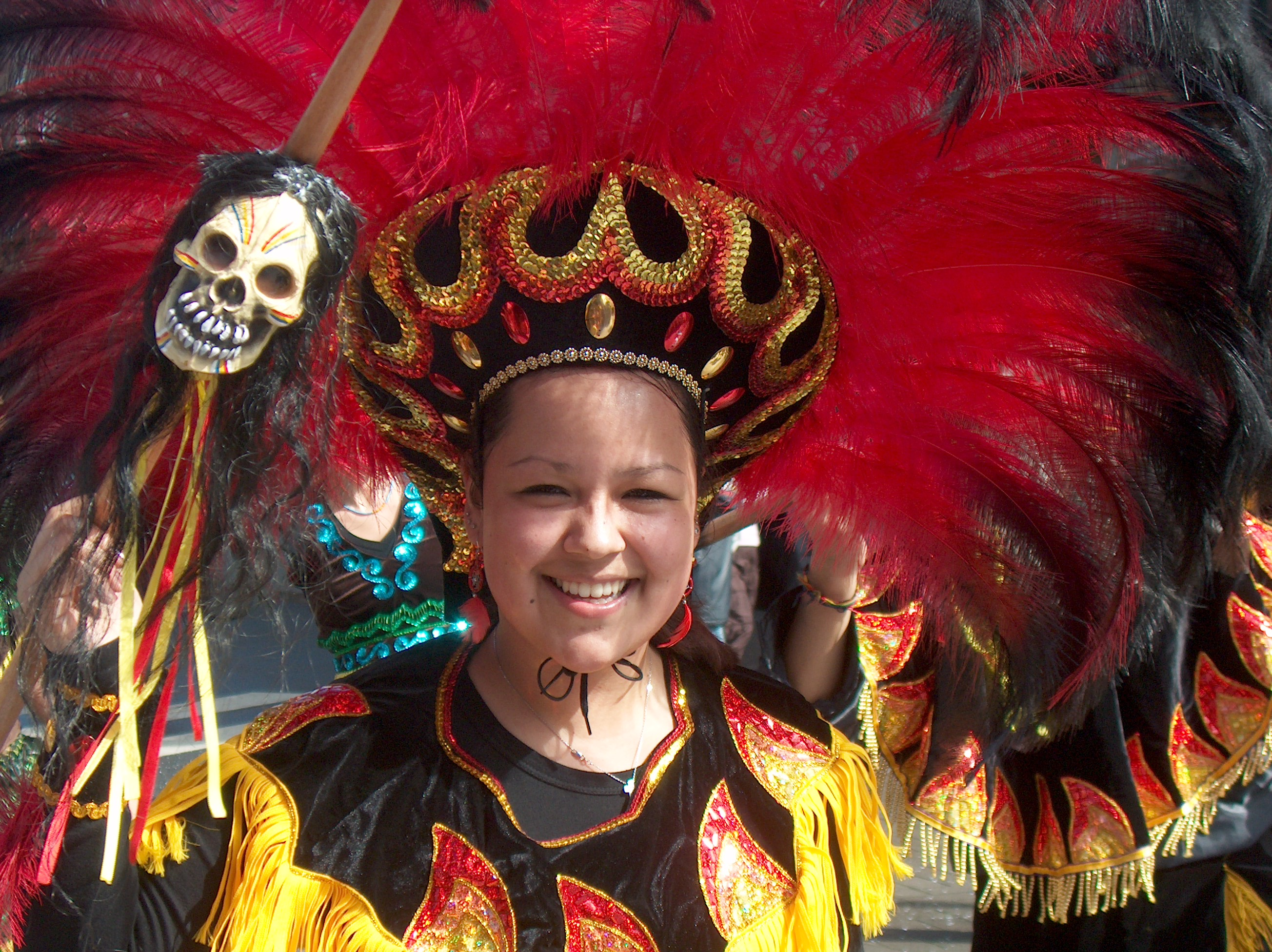 Le carnaval de Schaerbeek, le Scharnaval (Bruxelles).